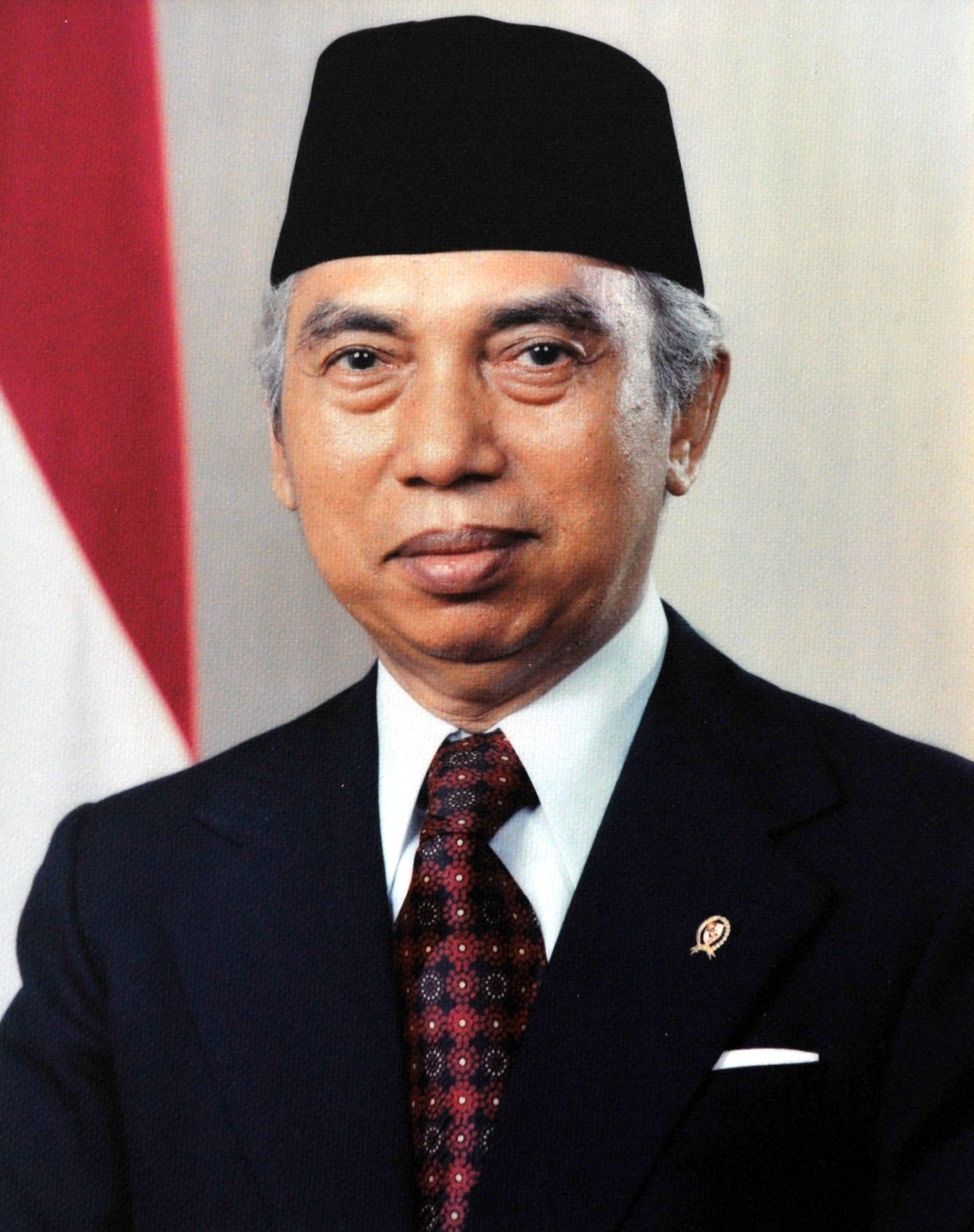 Wakil Presiden Republik Indonesia, Adam Malik